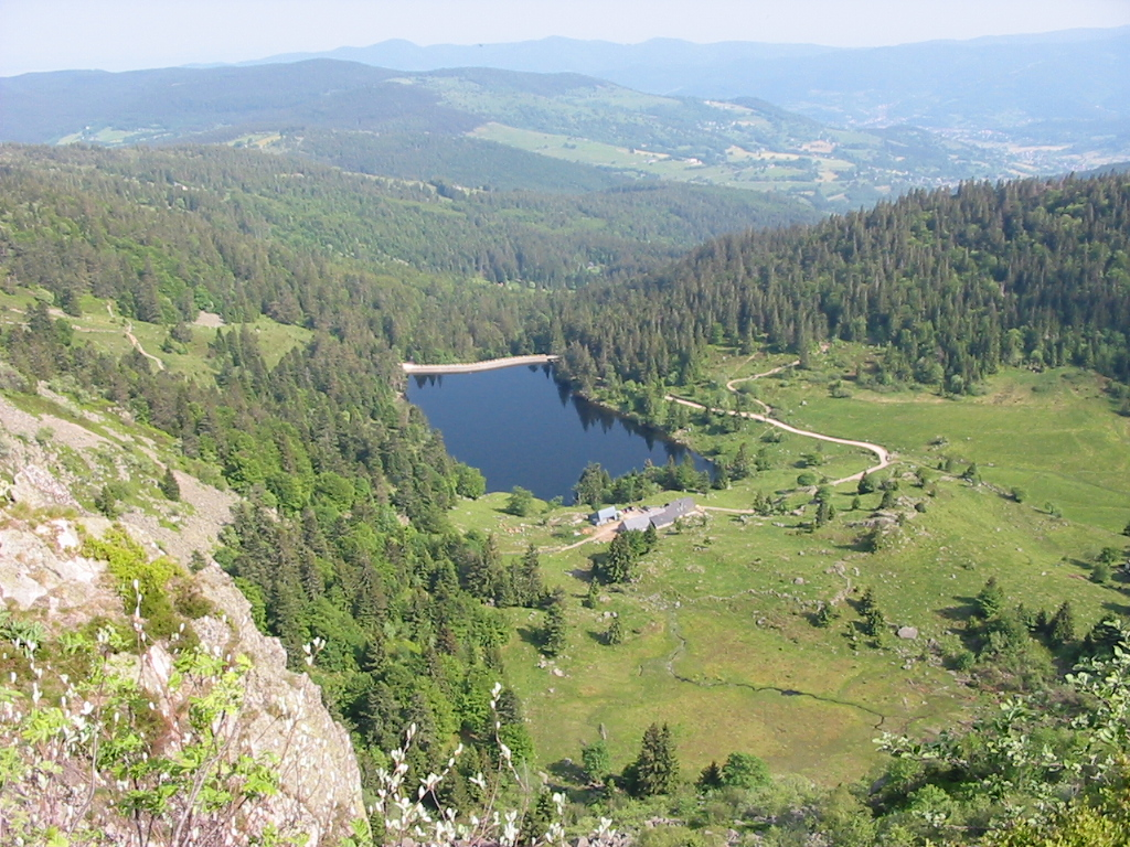 Le Forlet : lac des Truites Commune de Soultzeren (Haut-Rhin). En-deçà du lac, l'ancienne mare aux Carpes devenue tourbière. Vue prise du Taubenklangfelsen (1299 m). Photo personnelle du 12 juin 2006. Copyright © Christian Amet